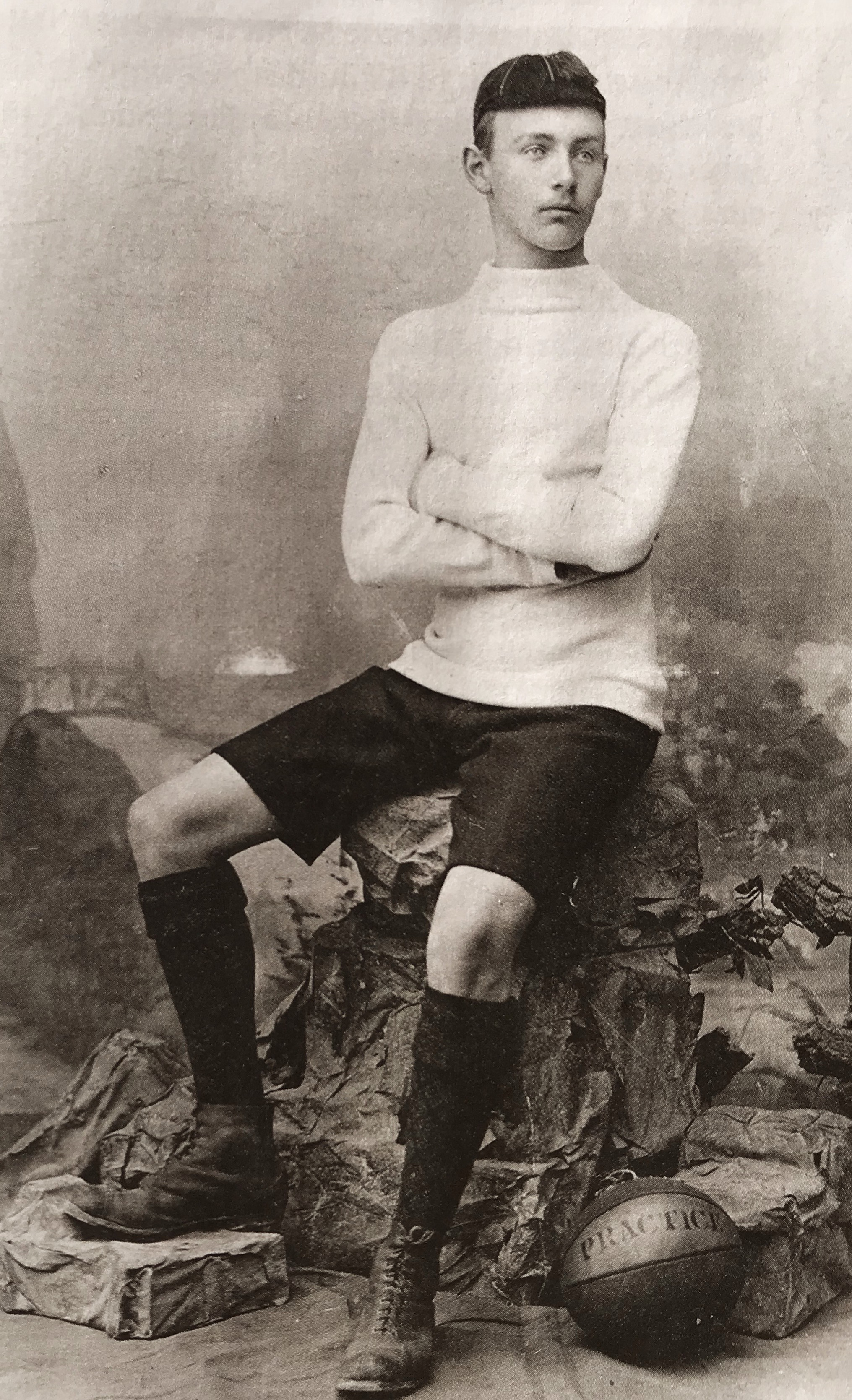 hans Gamperl 1896